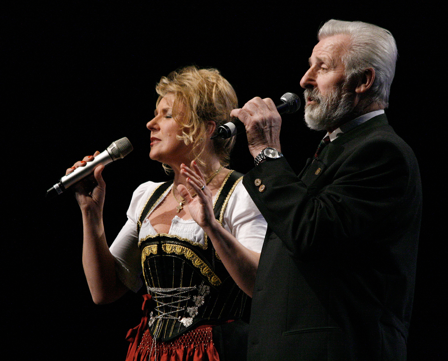 Angela und Wilhelm Wiedl mit der Musikantenstadl-Tournee in der Wiener Stadthalle.